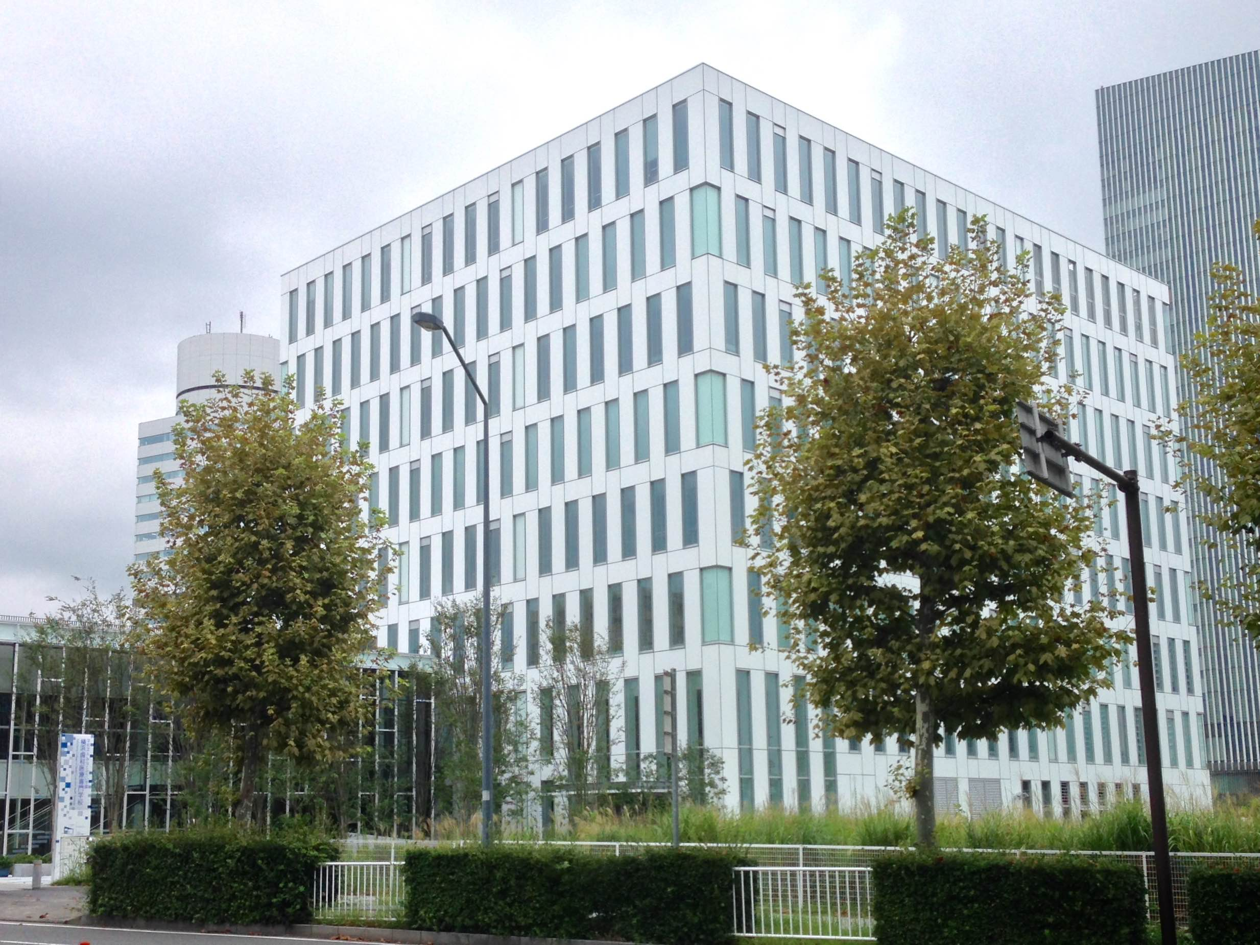 横浜市の歯科専門学校「みなとみらい学園 横浜歯科医療専門学校（旧称：鶴見歯科学園 横浜歯科技術専門学校）」。2016年9月にに移転した。